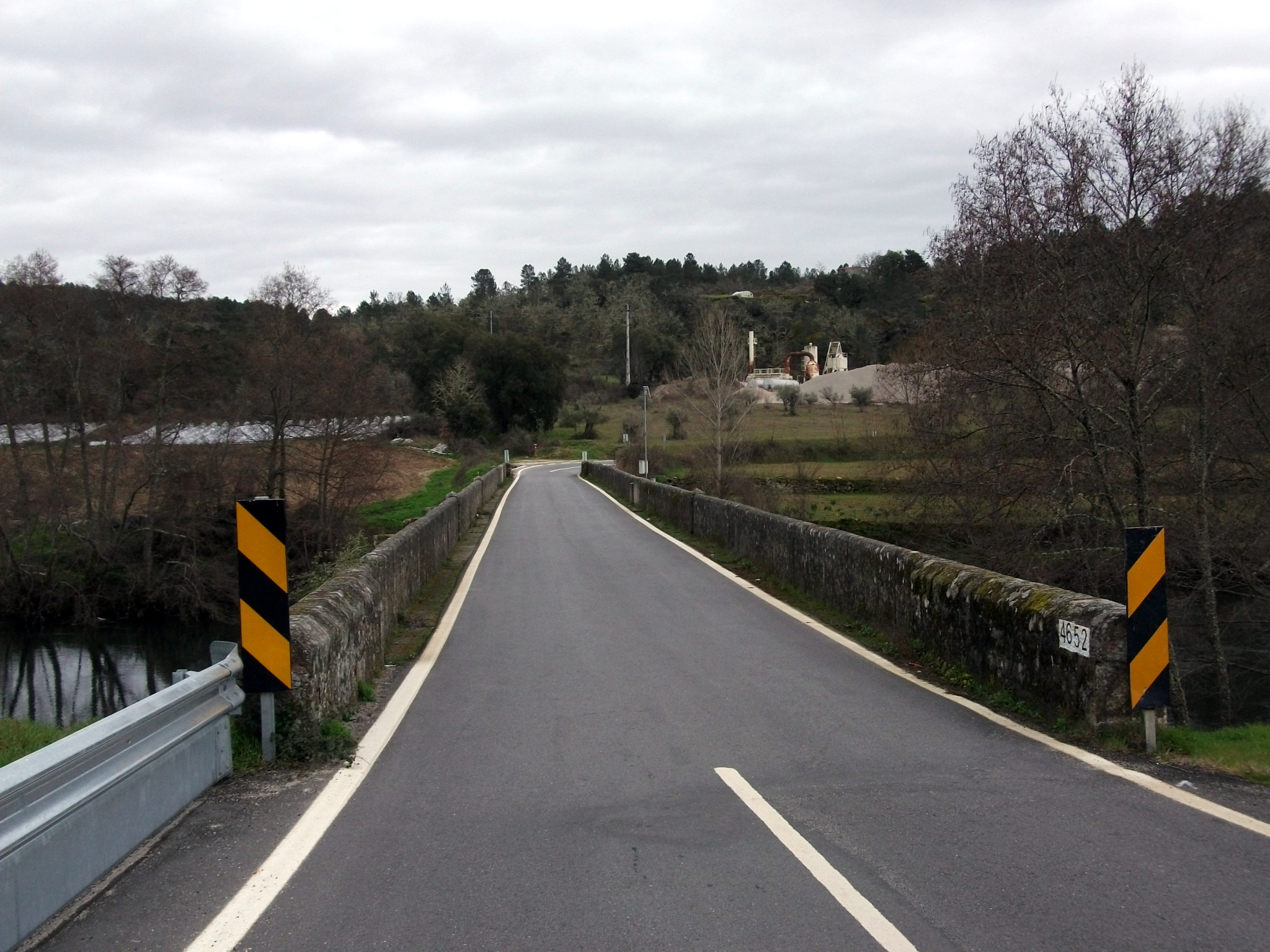 Vista tabuleiro da margem direita da "Ponte de pedra sobre o rio Tuela", também referida como "Ponte Românica sobre o rio Tuela" ou "Ponte de Torre de Dona Chama", na Estrada Nacional 206 em Torre de Dona Chama, Portugal.